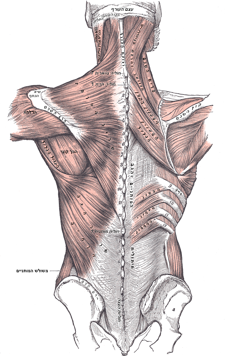 שרירי הגו-שכם